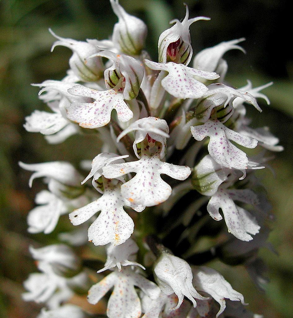 Neotinea tridentata subsp. conica